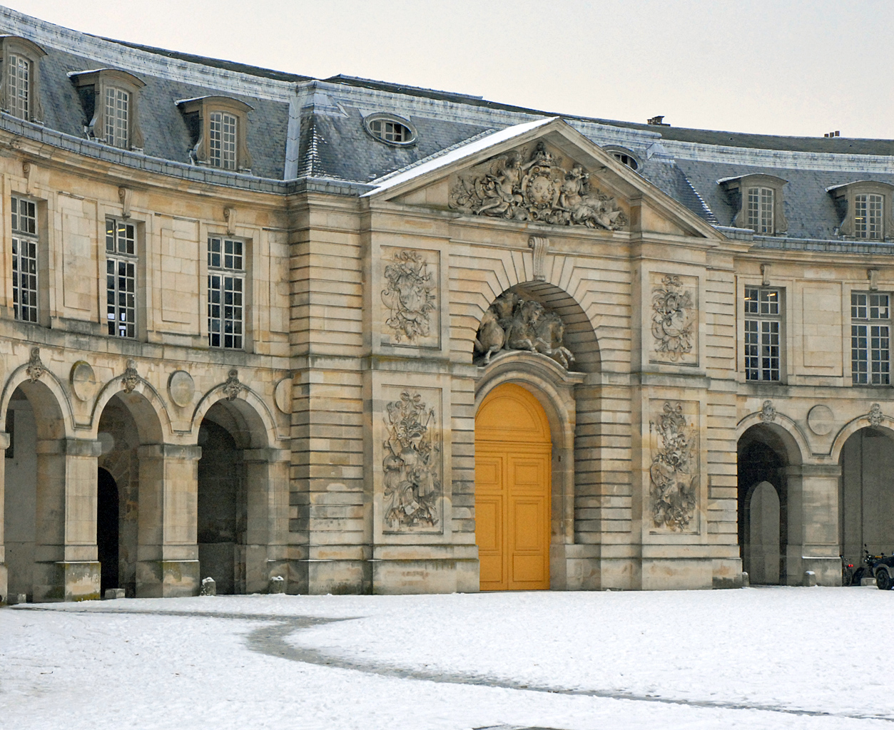 L’édification des deux bâtiments, la Grande Ecurie au nord et la Petite Ecurie au sud, s’opère de 1679 à 1682 sous la conduite de J. Hardouin-Mansart. La Petite Ecurie est achevée en 1681 et la Grande Ecurie l’année suivante. Un corps de bâtiment dit aujourd’hui "la Maréchalerie", construit derrière la Petite Ecurie de 1683 à 1685, vient compléter l’ensemble. En dehors de cette adjonction, la Grande Ecurie (ainsi nommée car sous les ordres du Grand écuyer) et la Petite Ecurie (qualifiée ainsi car elle n’est commandée que par le Premier écuyer) sont construites sur un plan identique en fer à cheval. (extraits du site sur les sculptures de Versailles) L'école d'architecture de Versailles occupe depuis 1969 une partie des Petites écuries du Roy (photo). Elle partage les lieux avec les ateliers de restauration des musées de France et du Château de Versailles qui sont situés dans les deux ailes du fer à cheval.